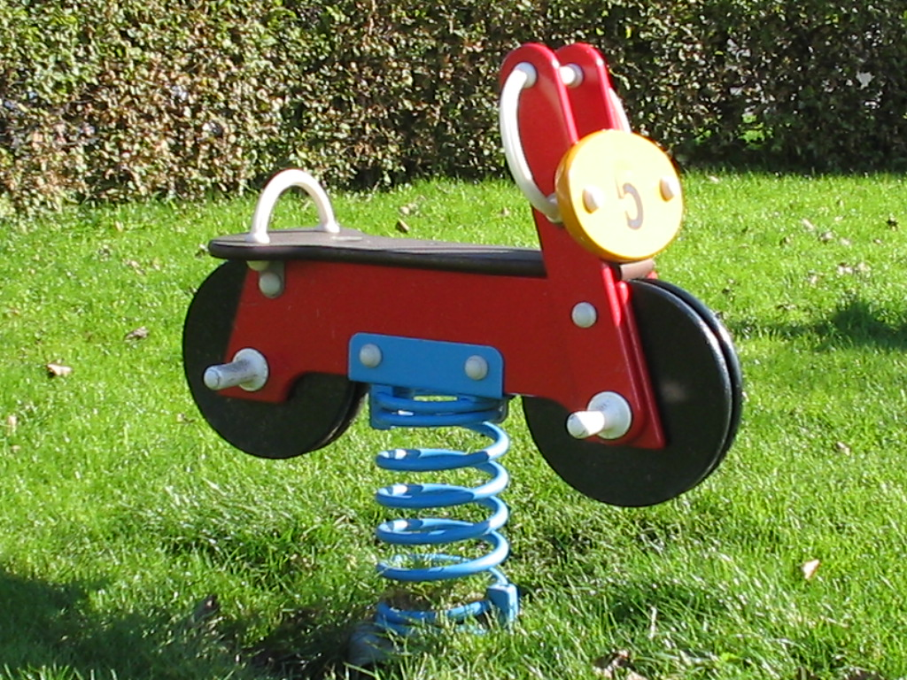 wipkip speeltuig